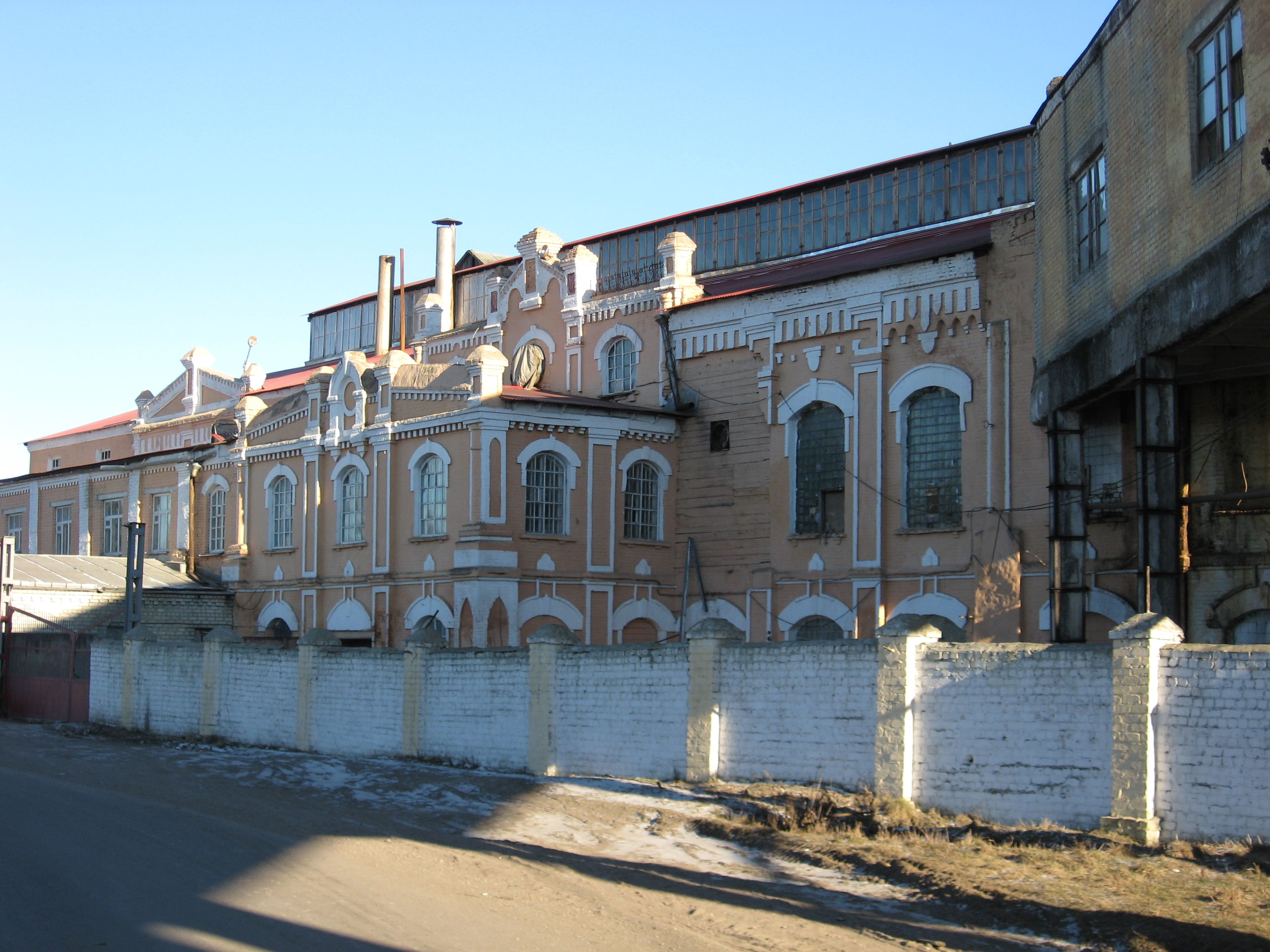 Сахарный завод в Лопандино (Брянская область)